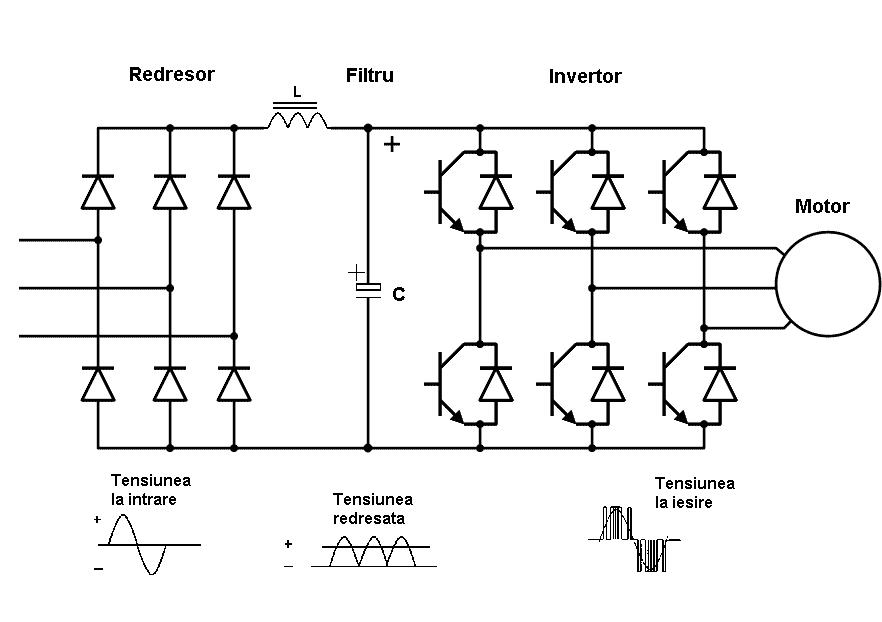 Variable frequency drive structure